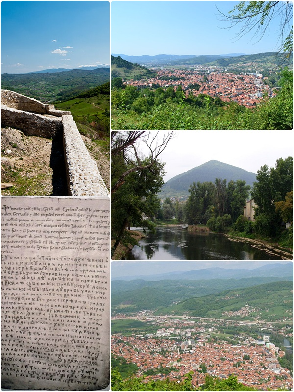 Visoko